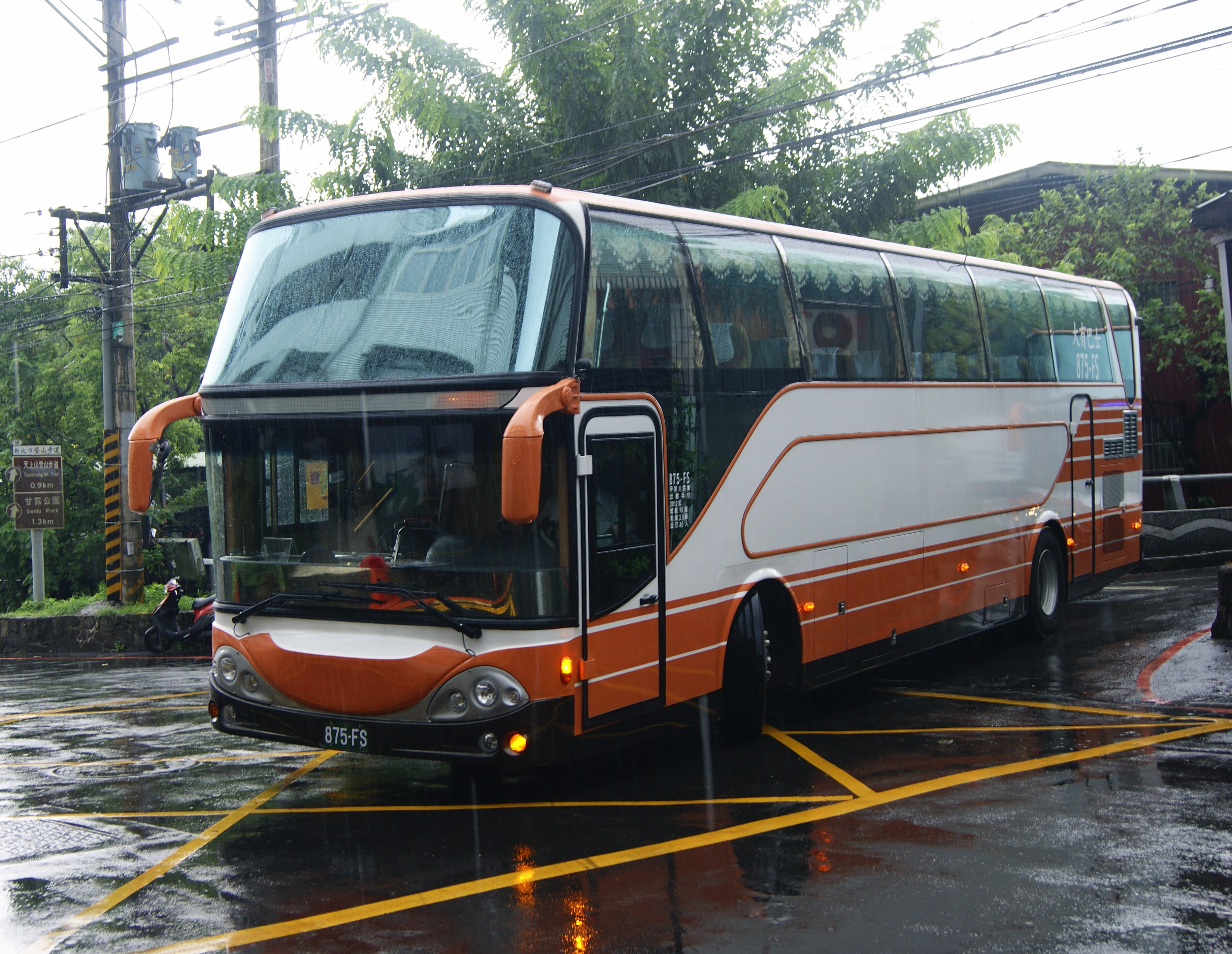 中文（台灣）: 大有巴士國道用車875-FS